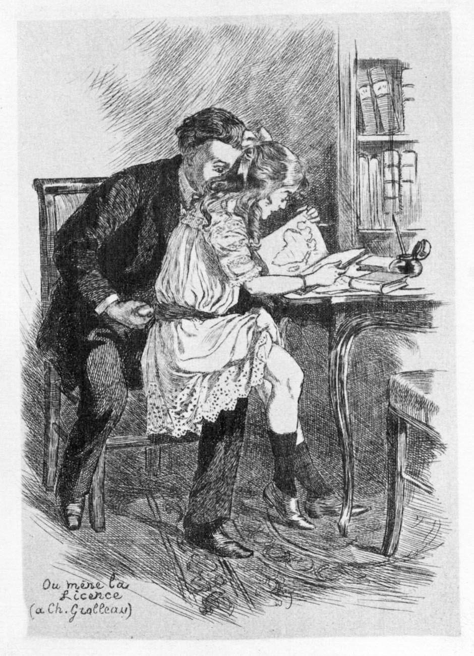 où mène la Licence